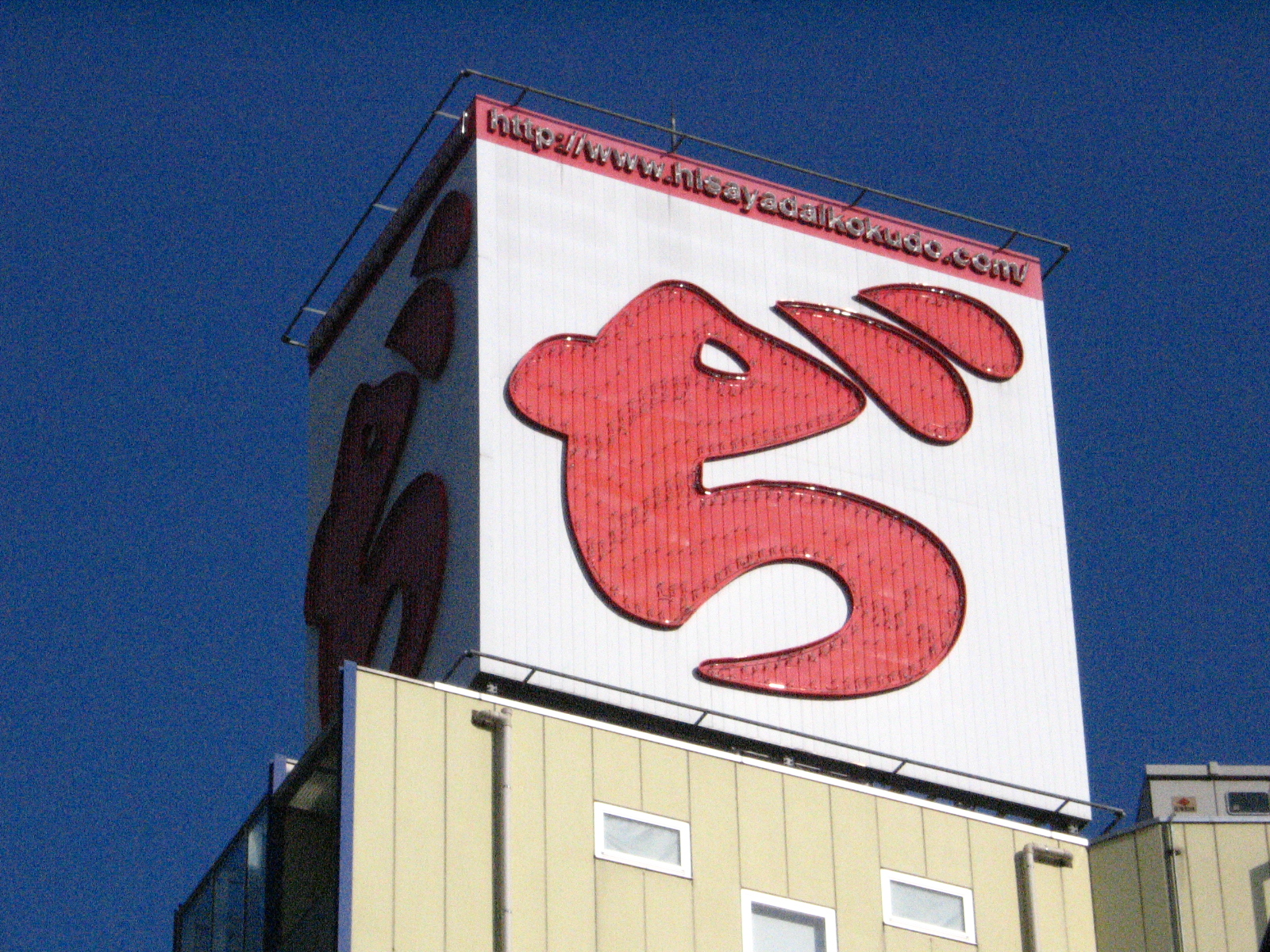 ヒサヤ大黒堂の「ぢ」看板（東京都中央区銀座）